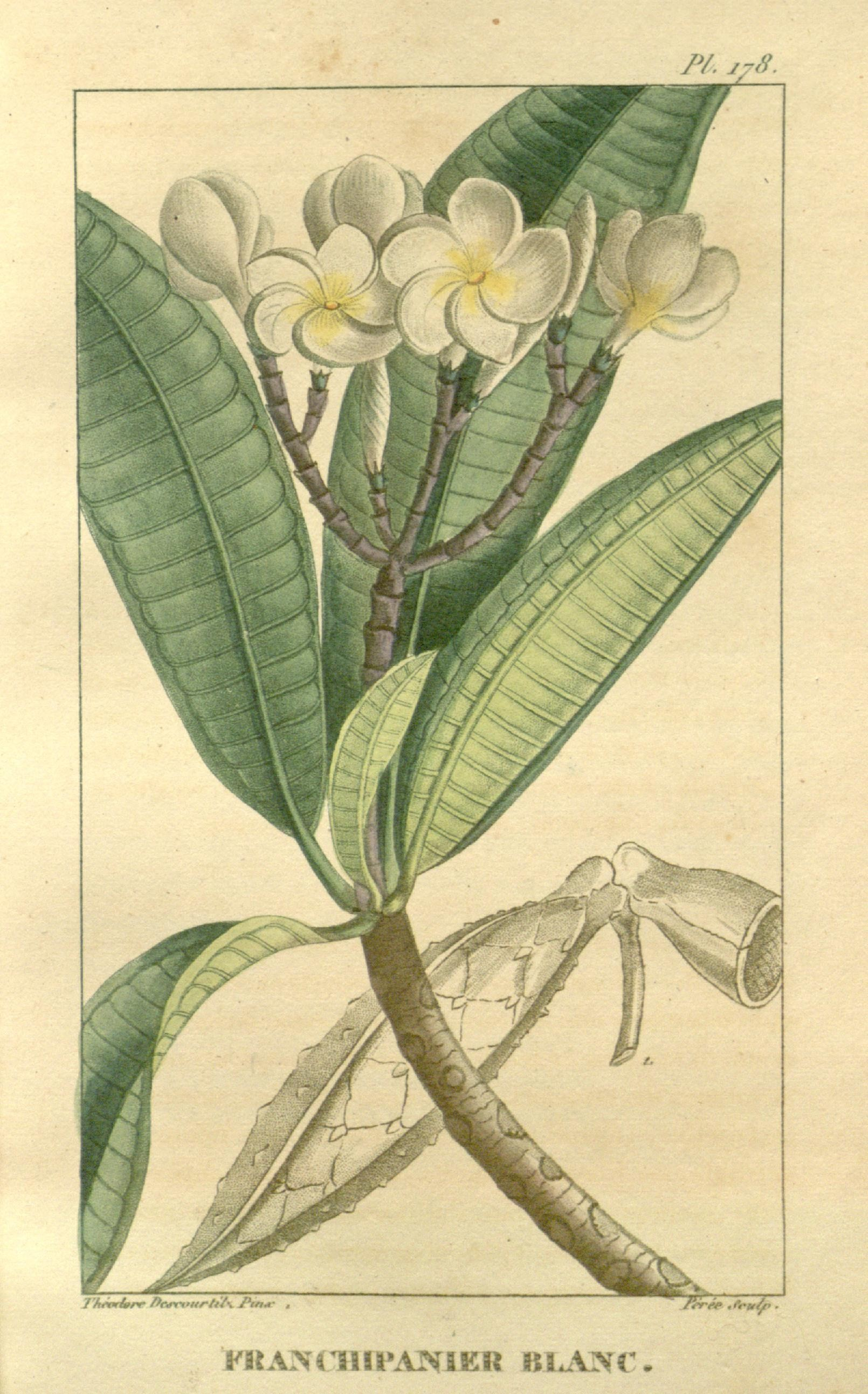 rhértUre Ihmwrt^/-. Jhn^- . ■ ft-n/f ■ PHANCIIIIPANIER BLzVNr*